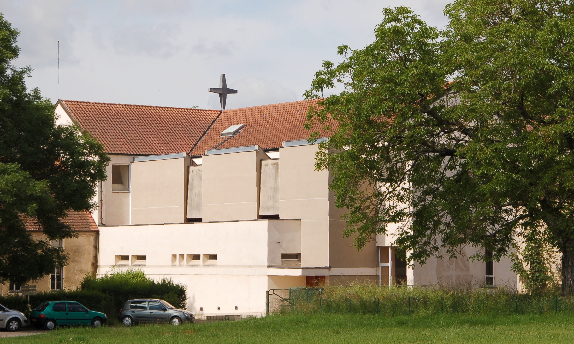 Cîteaux: Klosterkirche